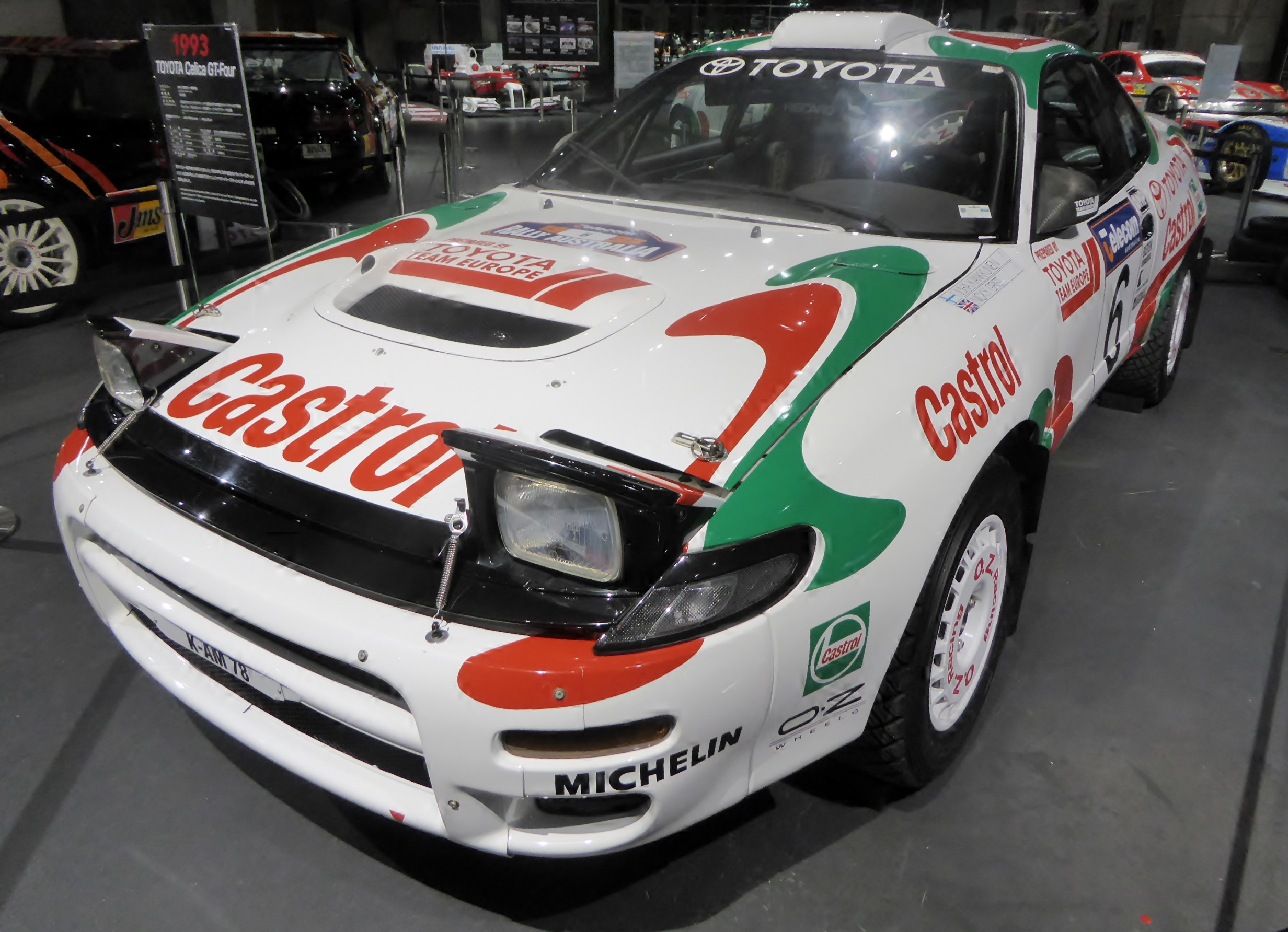 6号車カストロールセリカをフロントから撮影。